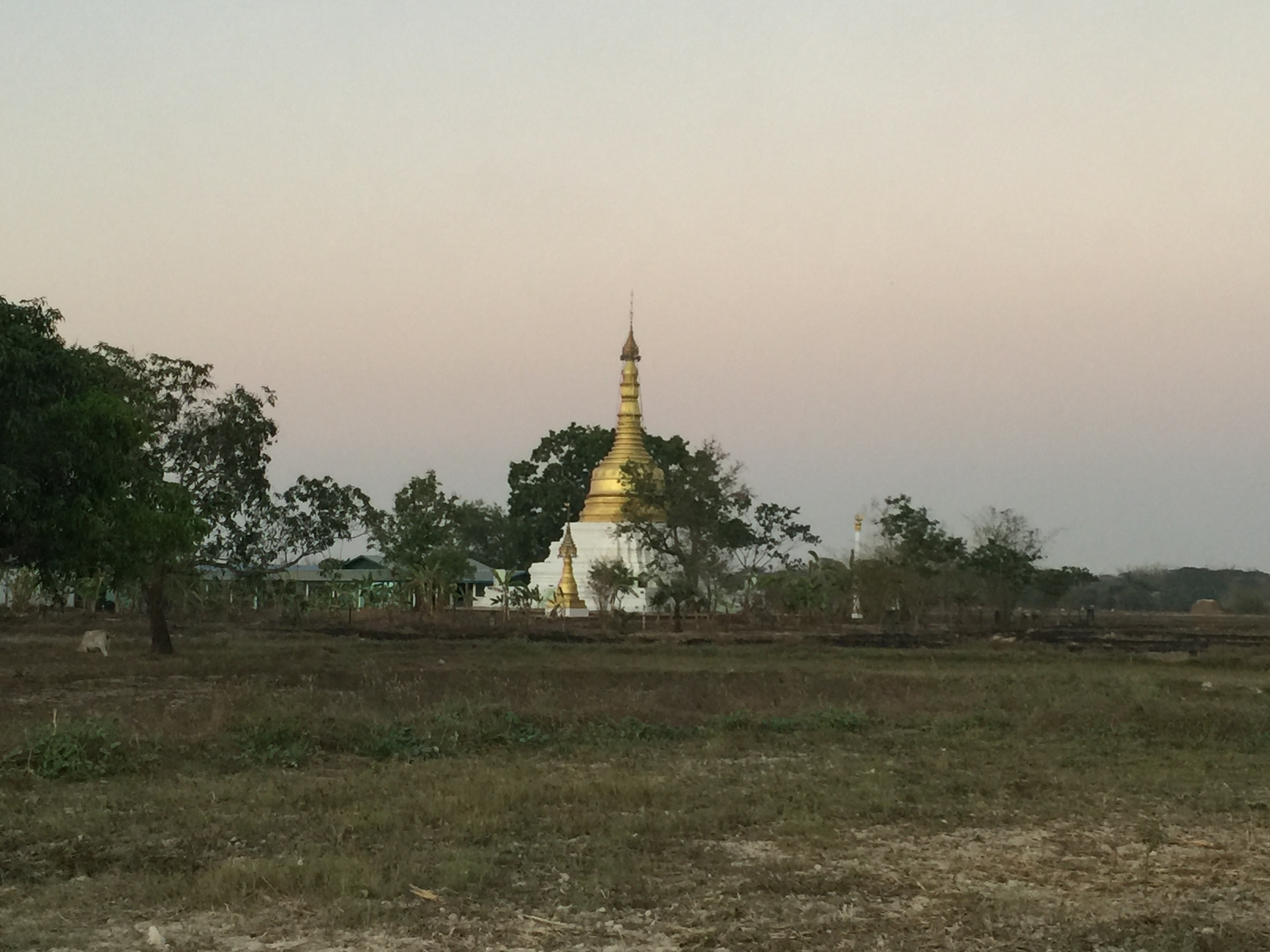 မြန်မာဘာသာ: မိုးကောင်းဘုရား၊ ခမေကြီးရွာ၊ ကဝမြို့နယ်